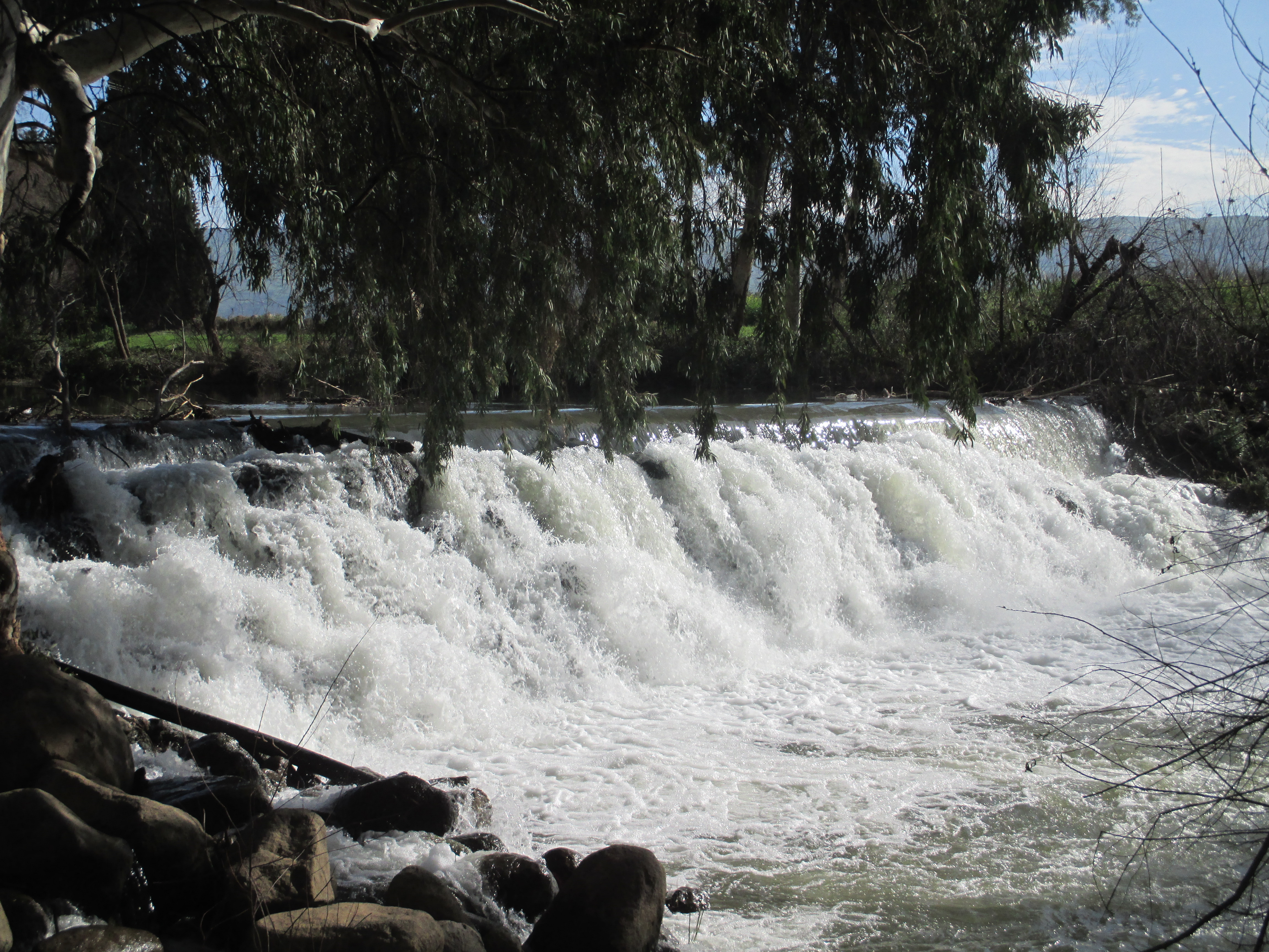 סכר הירדן בסמוך לכפר בלום